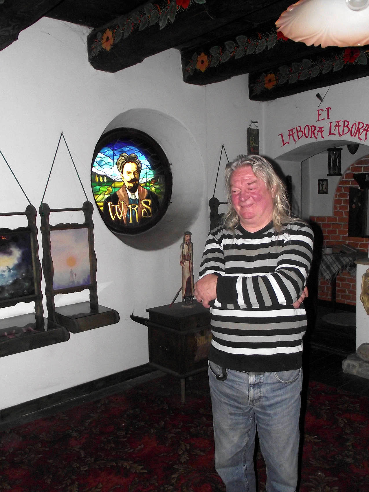 Tadeusz Modrzejewski, zakladatel Soukromého literárního muzea v Bílsku-Bělé.